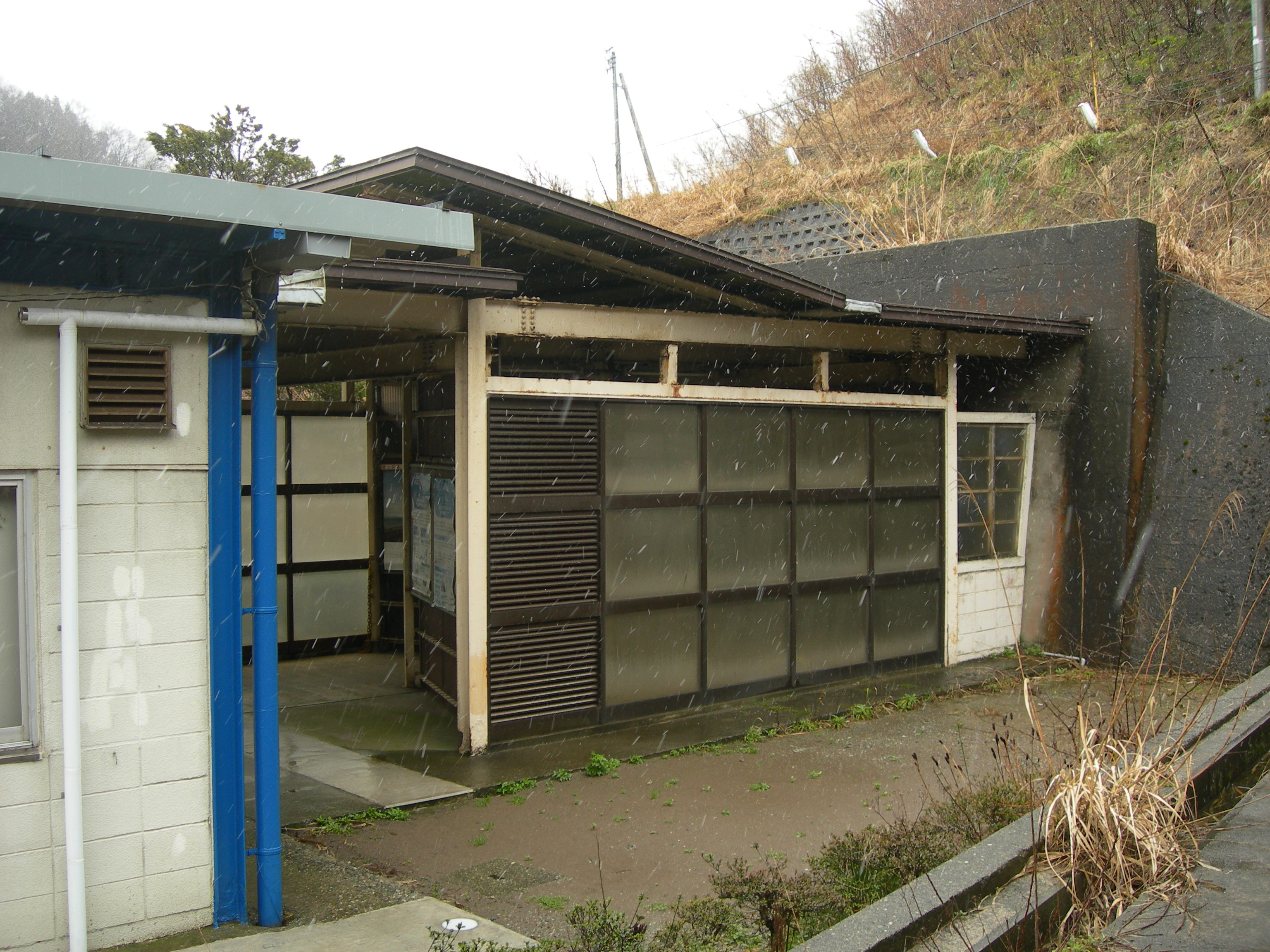 筒石駅のホームへつながるトンネル入り口